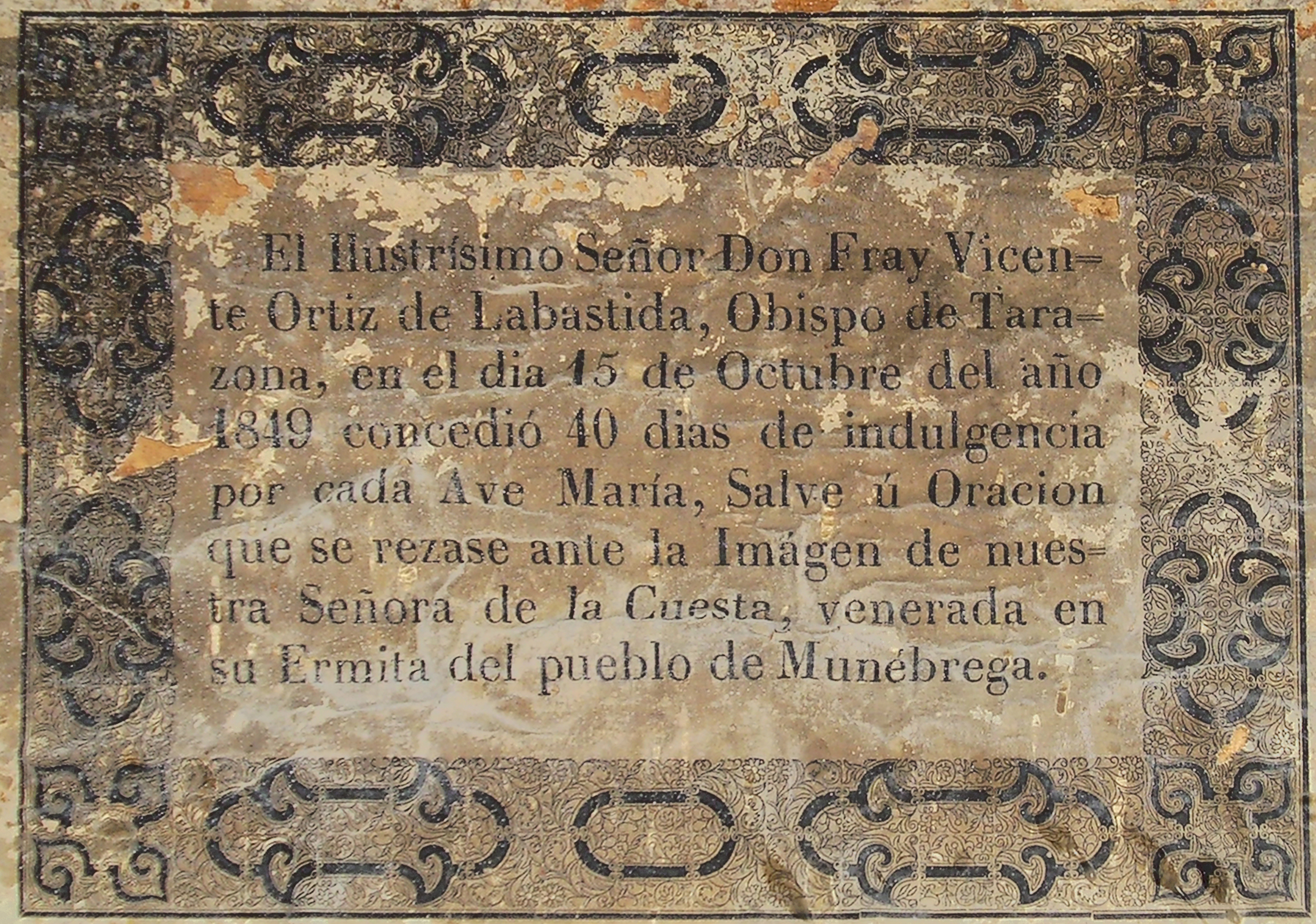 Concesión de indulgencias de 1849 por parte del obispo de Tarazona, Vicente Ortiz de Labastida. Transcripción: «El Ilustrísimo Señor Don Fray Vicente Ortiz de Labastida, Obispo de Tarazona, en el dia 15 de Octubre del año 1849 concedió 40 dias de indulgencia por cada Ave María, Salve ú Oracion que se rezase ante la Imágen de nuestra Señora de la Cuesta, venerada en su Ermita del pueblo de Munébrega.»